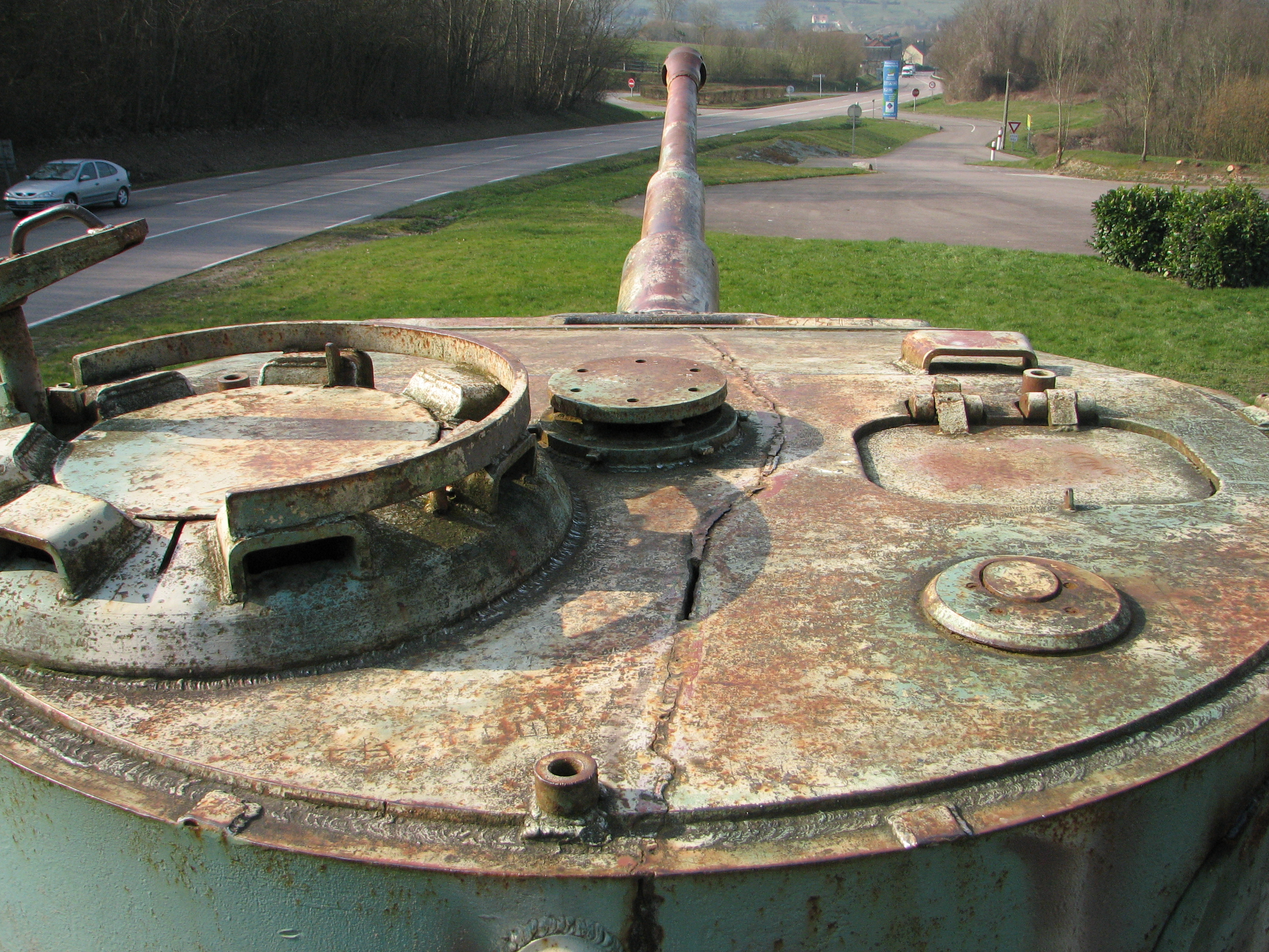 Dessus de la tourelle du char Tigre de Vimoutiers} avec à gauche le tourelleau du chef de char, tourelleau de 2e type moins haut et dont la trappe est à ouverture horizontale. On aperçoit la trace de la découpe faite par les ferrailleurs en 1975 et sommairement resoudée